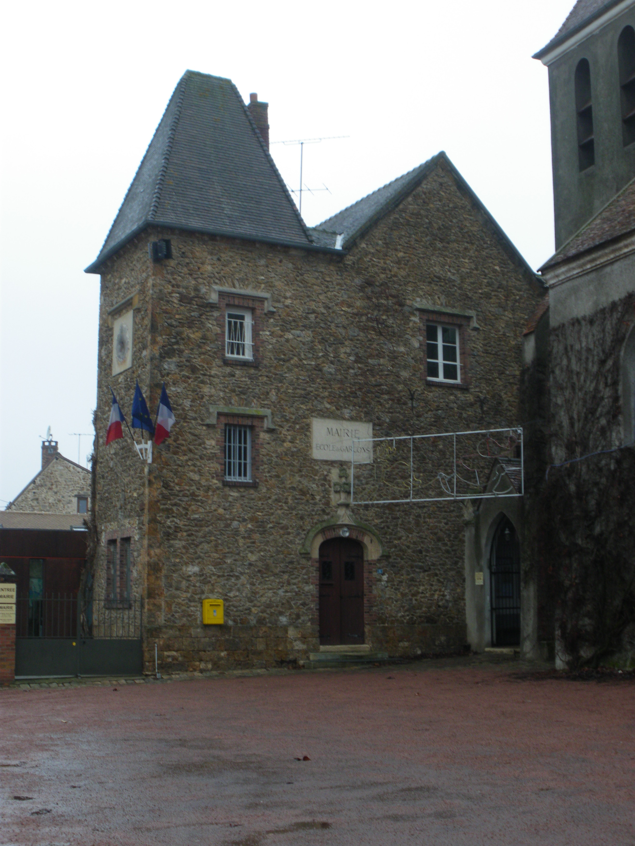 Mairie de Fontenay les Briis, Essonne, France